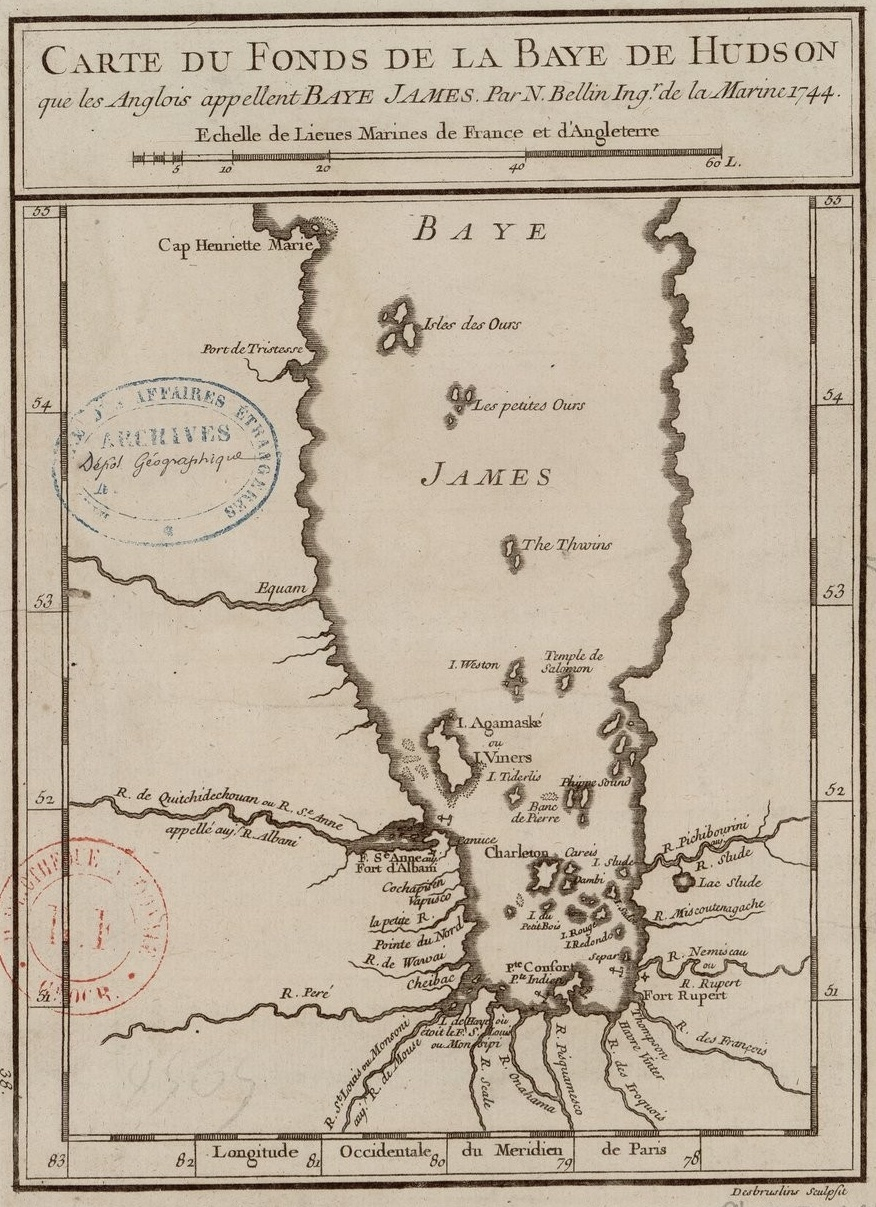 Carte de la baie James, au fond de la baie d'Hudson, dressée en 1744 par le cartographe de la Marine Nicolas Bellin.